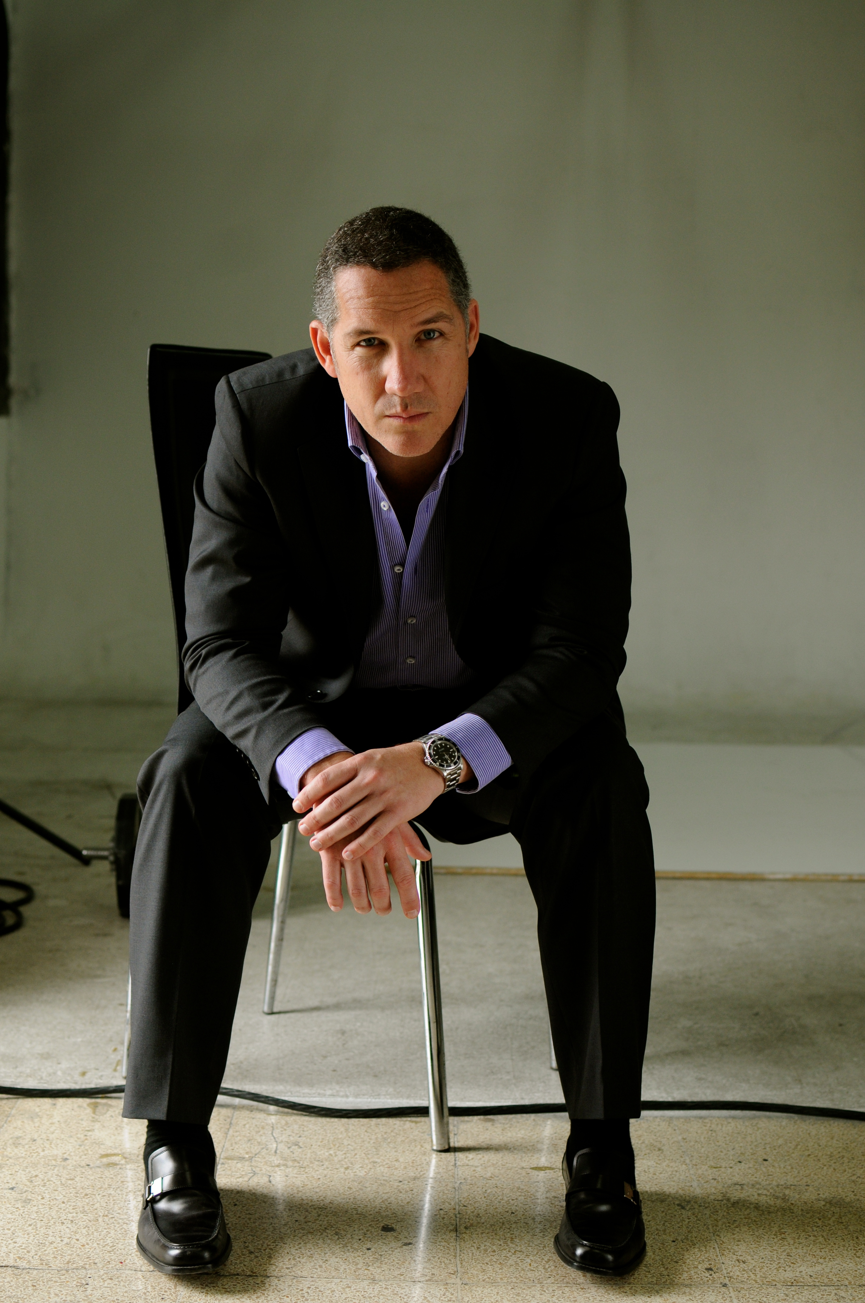 Eduardo Maruri